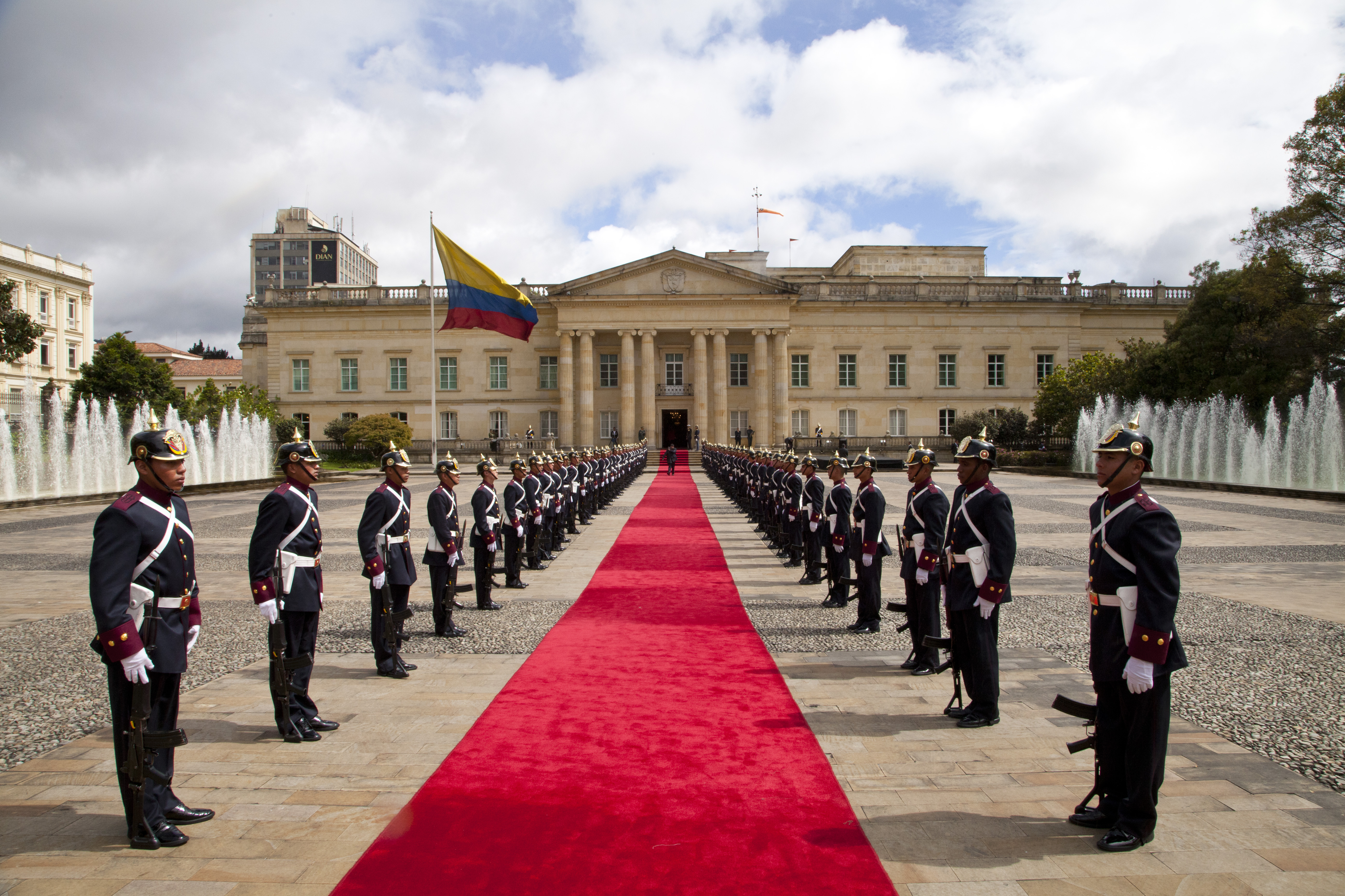 Bogotá (Colombia), 11 de Junio 2012. Este lunes el Ministro de Relaciones Exteriores, Comercio e Integración, Ricardo Patiño, asistió a la ceremonia de traspaso de la Secretaría General de UNASUR, que se realizó en el Palacio de Nariño, sede de la Presidencia de la República de Colombia. Foto: Fernanda LeMarie - Ministerio de Relaciones Exteriores, Comercio e Integración.